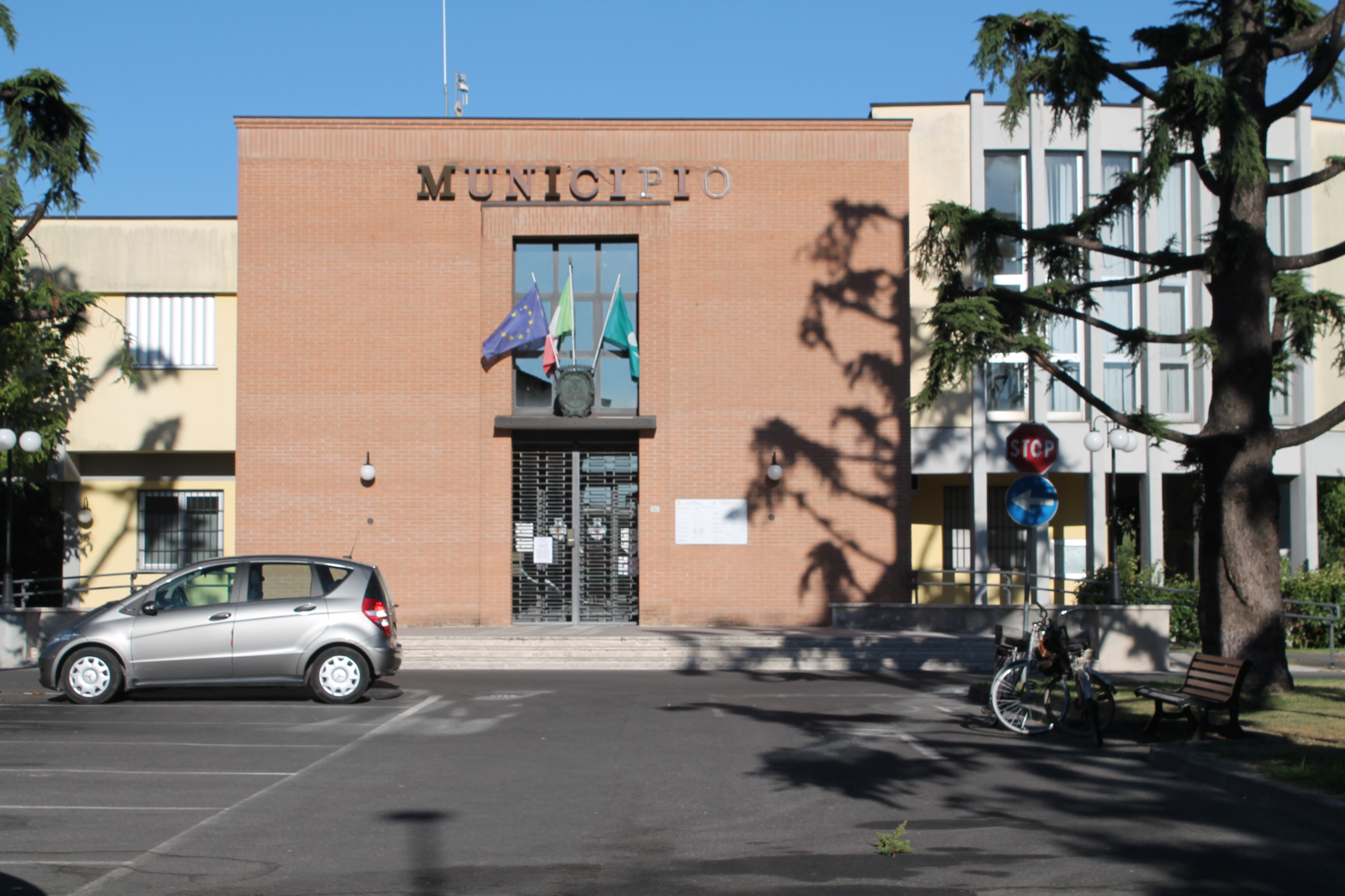 Foto del Municipio di Castelcovati